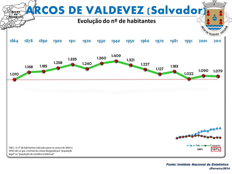 Censoa 1864/2011